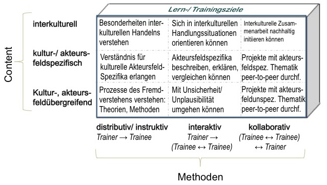 Maßnahmen zur interkulturellen Personalentwicklung